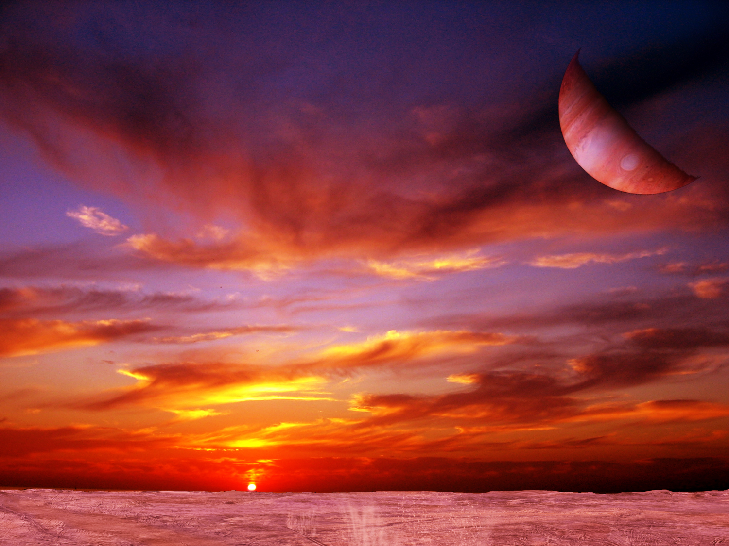 Images sources : (de RonAlmog)